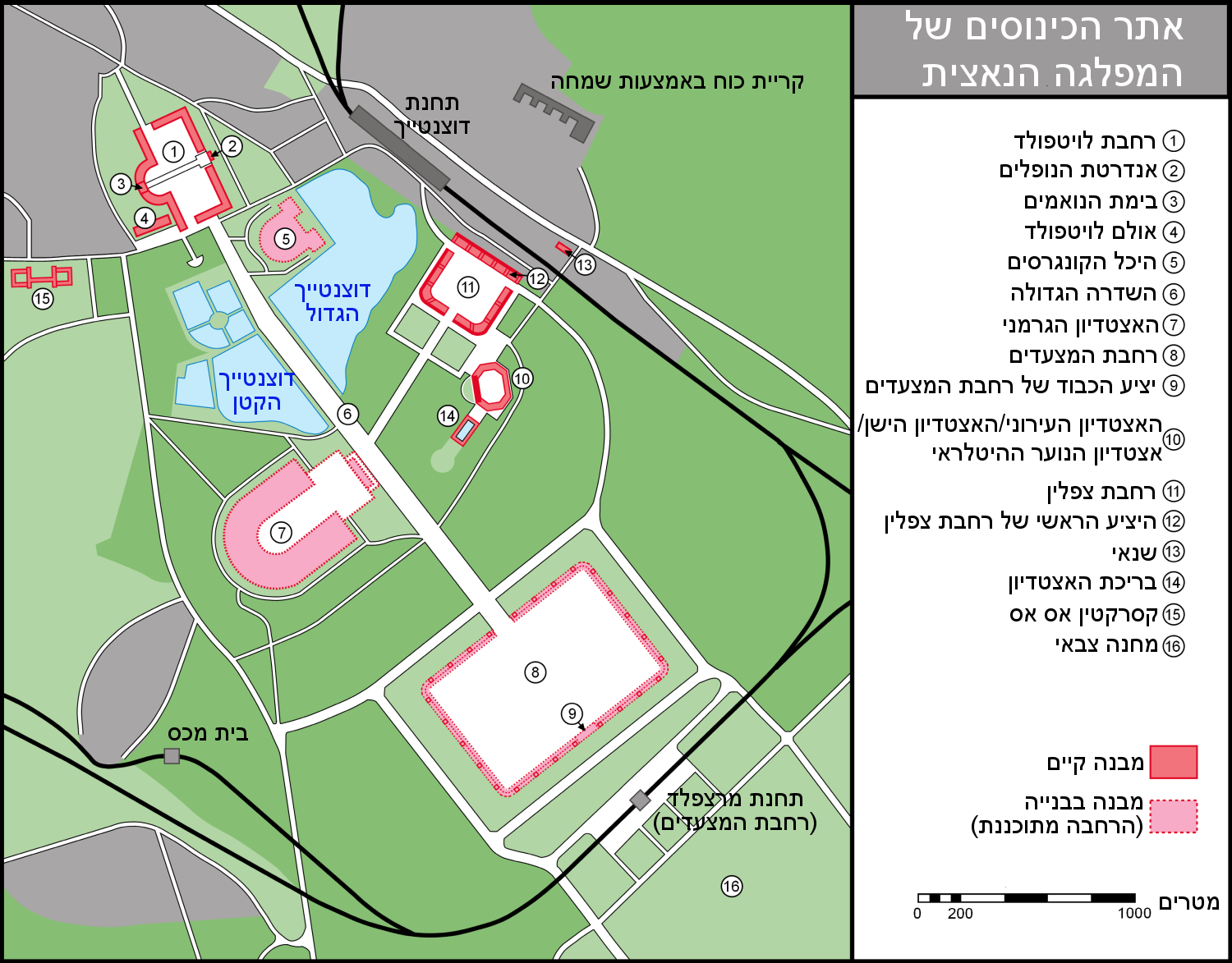 אתר הכינוסים של המפלגה הנאצית